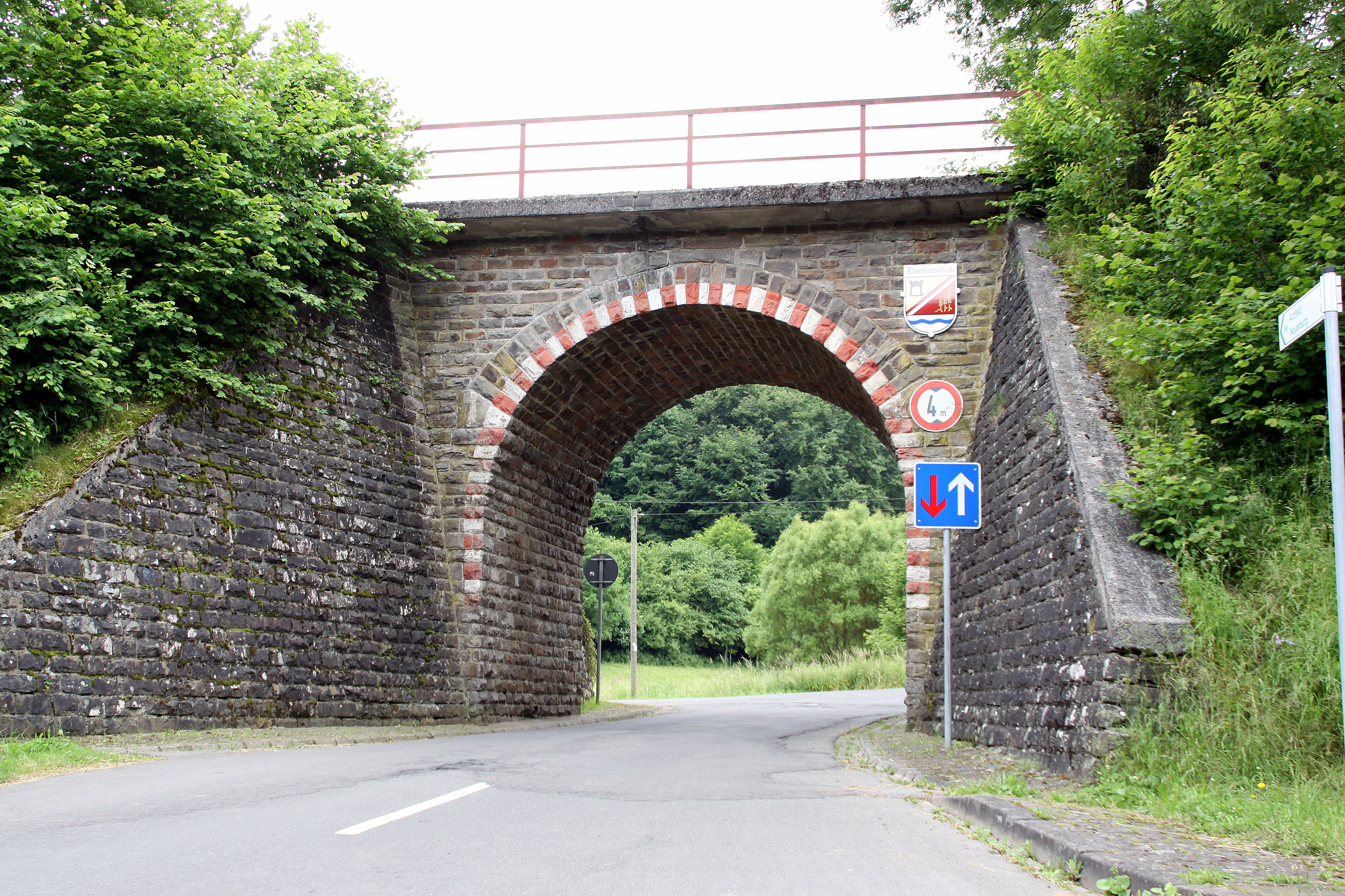 Bréck bei Zweifelscheid